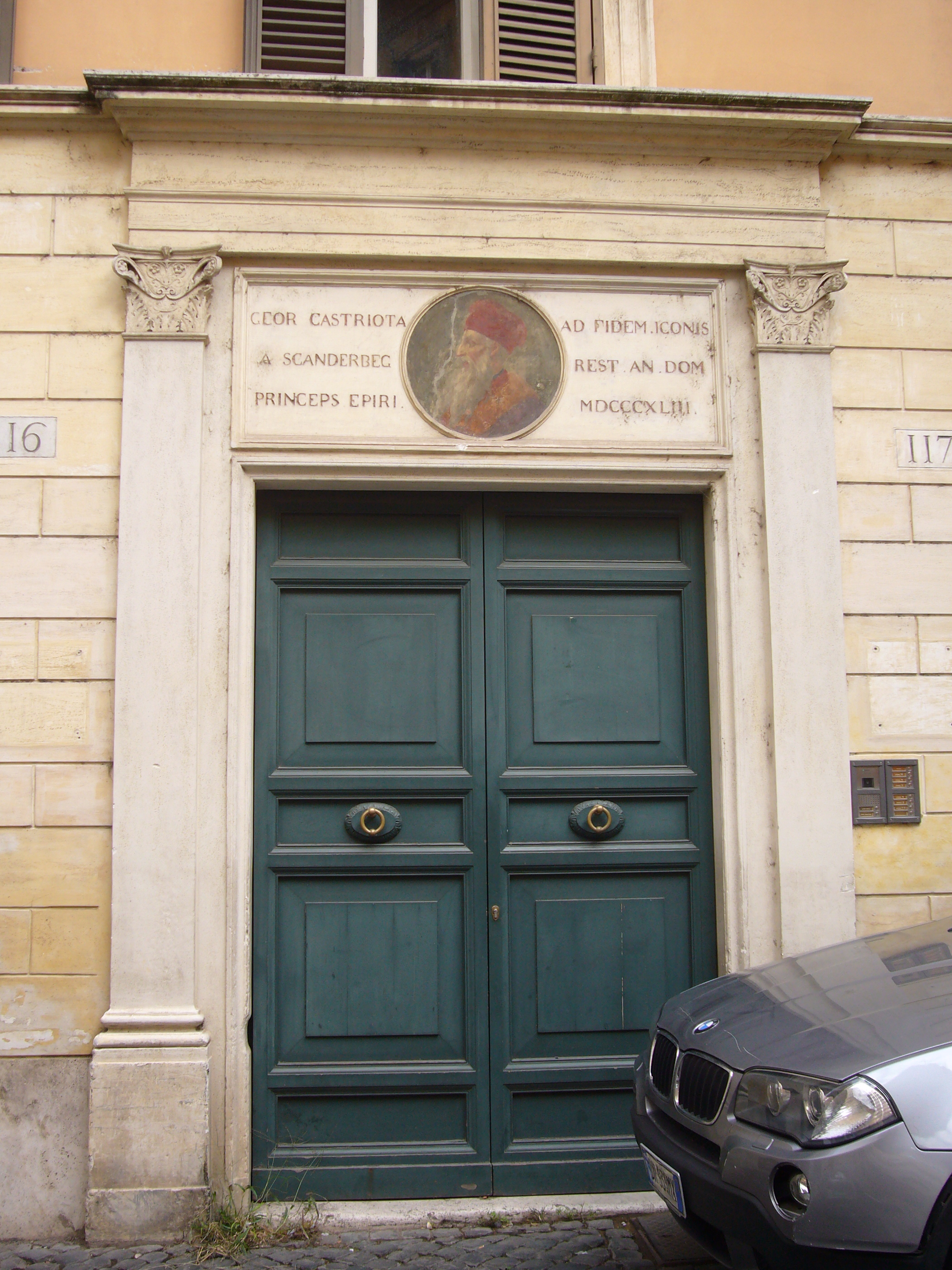 Roma, vicolo Scanderbeg: il palazzetto romano del Castriota, con il suo ritratto, che per fedecommesso deve essere mantenuto leggibile a cura degli eredi, pena la perdita della proprietà da parte di questi ultimi.